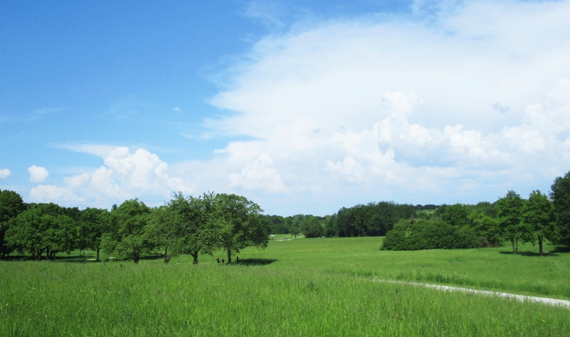 Volkspark Niddatal Frankfurt am Main, Blick von der Hausener Terrasse in den Park